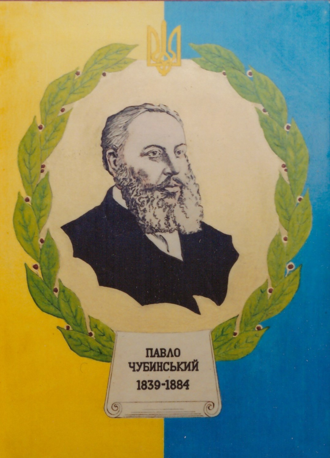 Плакат. Павло Чубинський. Серія «Літературні пам’ятки України». 1998. Скульптор Таранченко В.О. Папір, туш, гуаш, бронзовий порошок, дерево. 60 х 43 х 2,5.